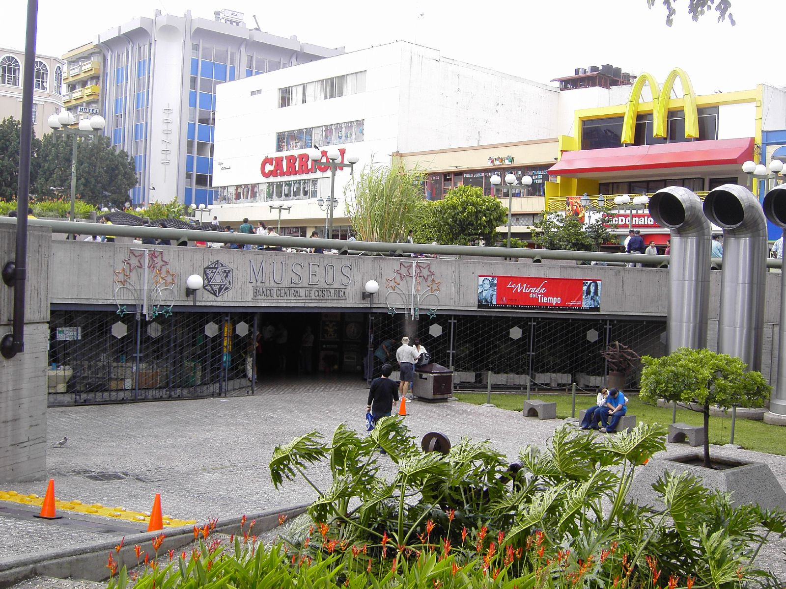 Museo de Oro, San Jose, Costa Rica